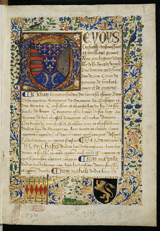 Première page de l'aveu rendu à René, roi de Jérusalem et de Sicile, duc d'Anjou, pair de France, duc de Bar, comte de Provence, de Forcalquier et de Piémont, par Jean de Montespedon, dit Houaste, baron de Beaupréau, seigneur de Beauvoir, de Basoges et de Montis, conseiller et chambellan du roi et son bailli de Rouen, pour sa terre de Beaupréau située en Anjou. Dans l'encadrement figurent notamment les armes des seigneurs de Beaupréau (bannière carrée attachée à sa hampe et portant d'or à cinq fusées de gueules en fasce et sept croisettes d'azur enhendées). Dans la lettre initiale D figurent les armes de France, de Bar, de Hongrie et la croix de Jérusalem (Archives nationales, AE/II/481/A).